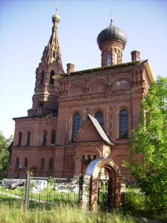 Церковь в селе Гора-Валдай Ломоносовского района Ленинградской области